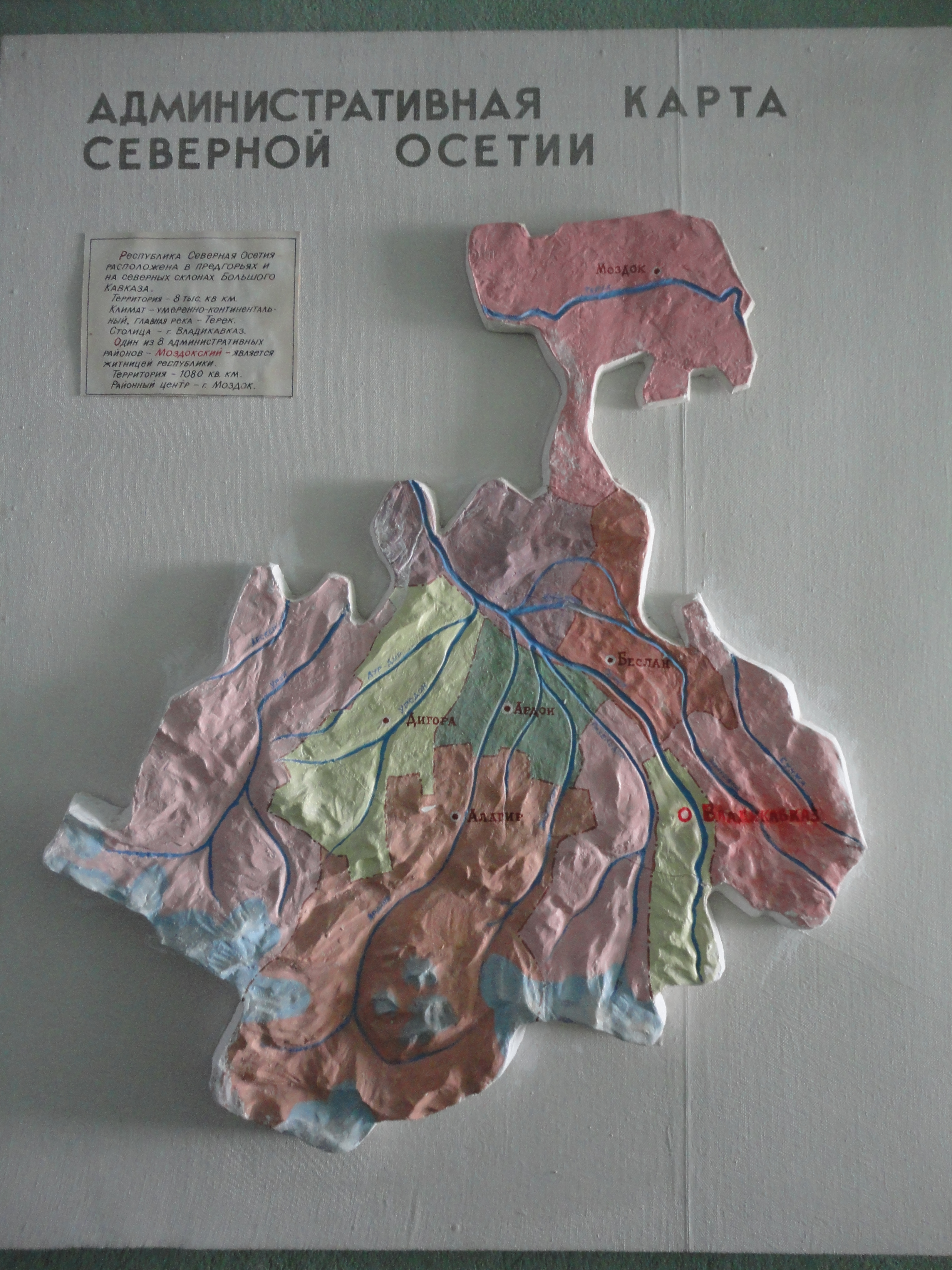 Моздокский краеведческий музей